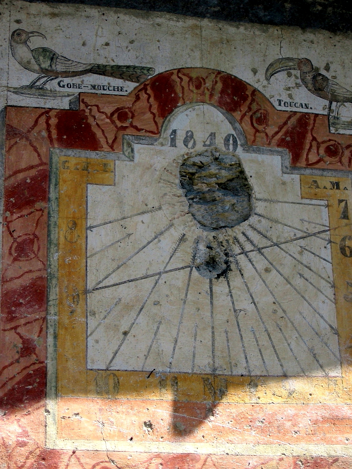 Cadran solaire à Saint-Véran, Hautes-Alpes, France